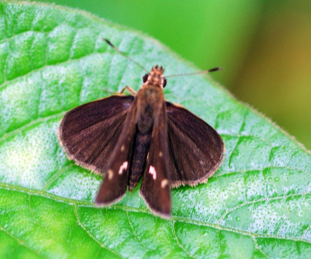 Vindhyan bob WSF Arnetta vindhyana